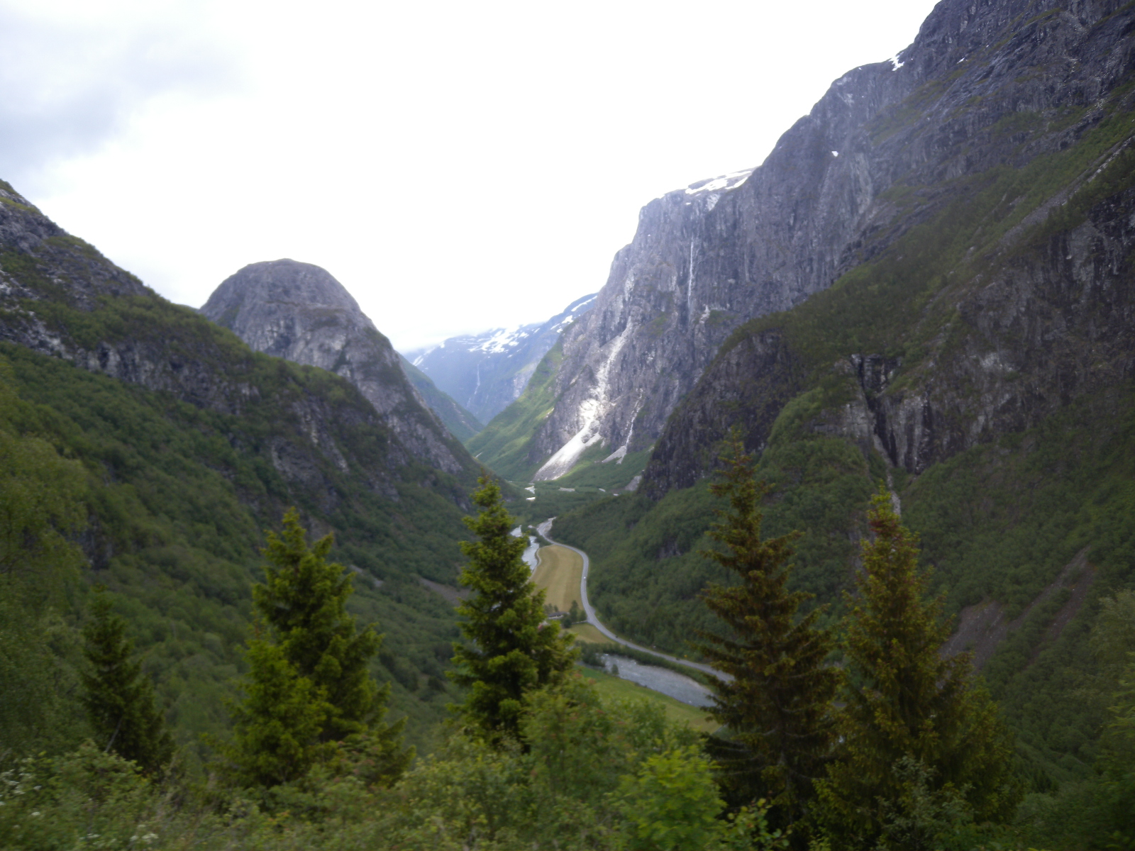 Nærøydalen frå Stalheimskleivi. Fjelltoppen til venstre er Jordalsnuten. Grensa mellom Voss/Hordaland og Aurland/Sogn og Fjordane går over Jordalsnuten. Vegen ein ser er Europaveg 16, elva er Nærøydalselvi.